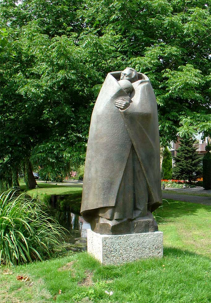 De ontheemden (brons, 1964) door Albert Stewart - Dunantsingel/Bernadottelaan Gouda